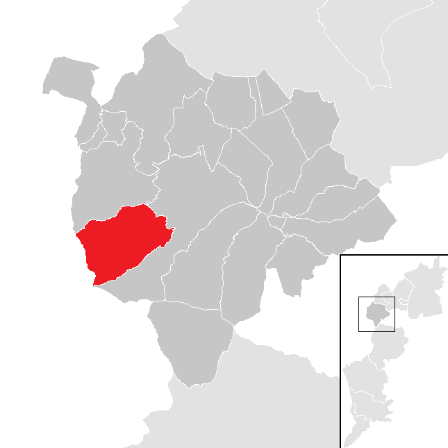 Bezirk Mattersburg